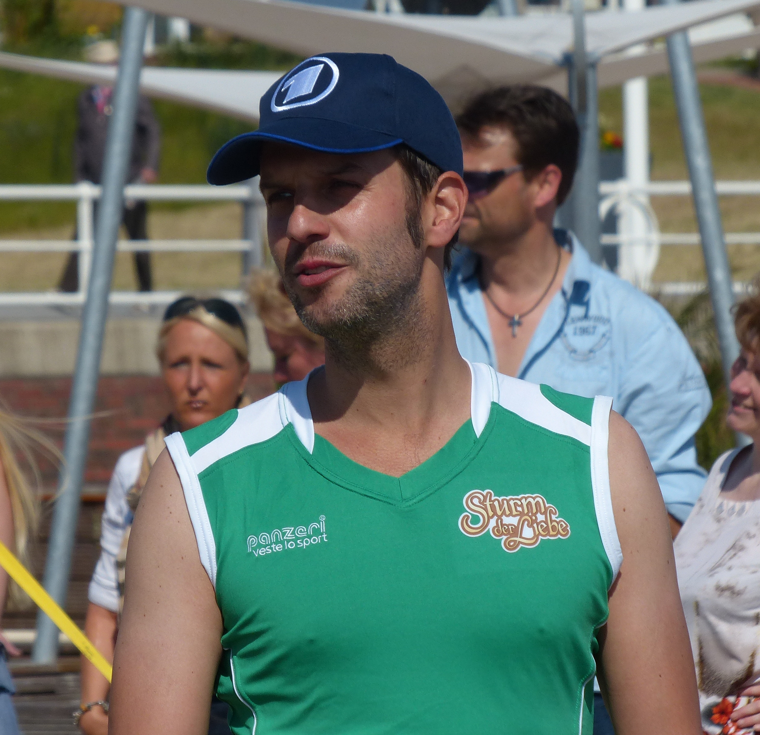 Florian Stadler beim Beachvolleyball-Starcup